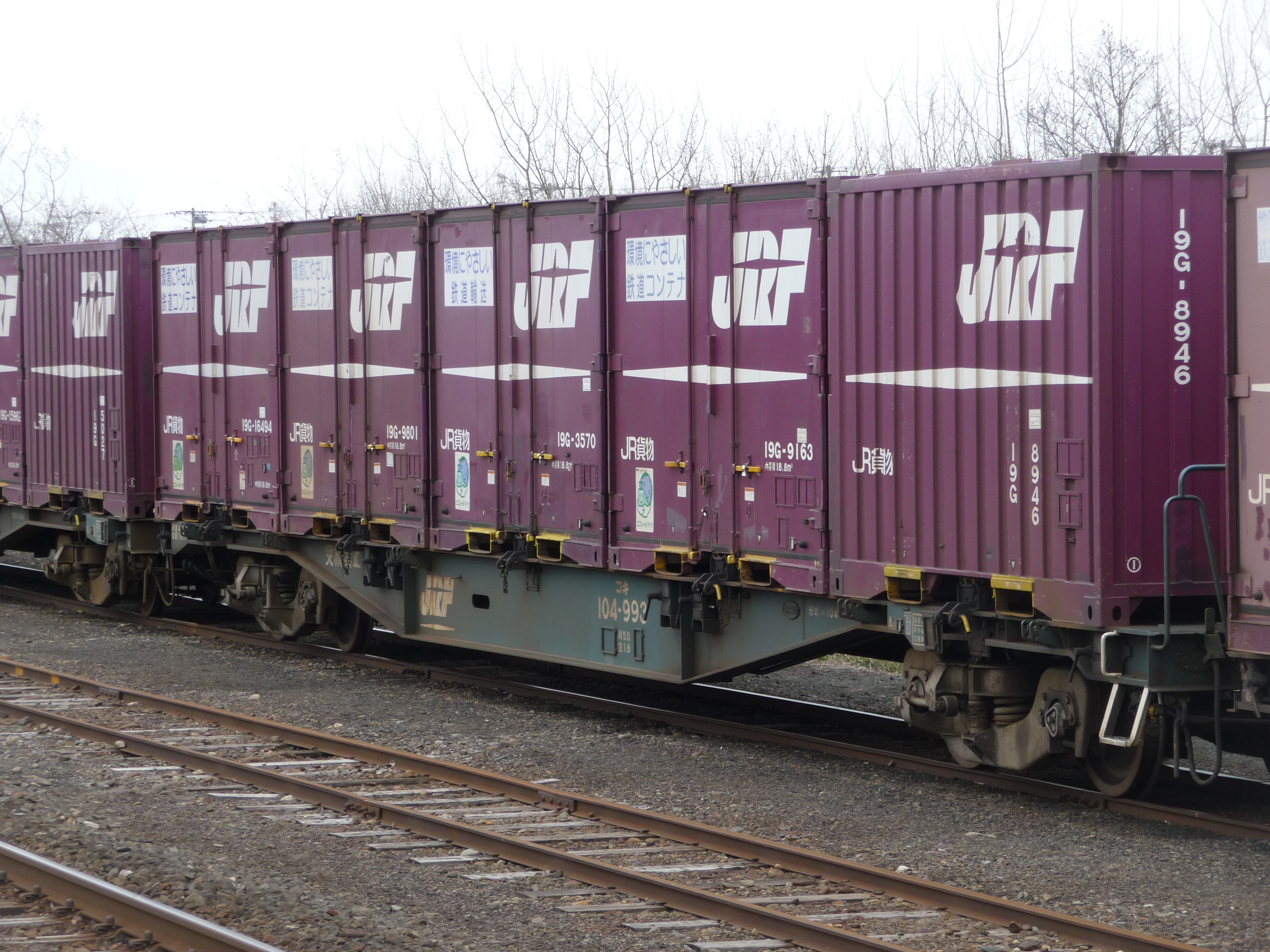 JR貨物コキ104形コキ104-993。根室本線・新富士駅で撮影。Panasonic Lumix DMC-TZ5